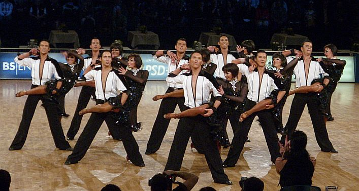 Lateinformation des Grün-Gold-Club Bremen (B-Team) bei der Deutschen Meisterschaft der Formationen 2009